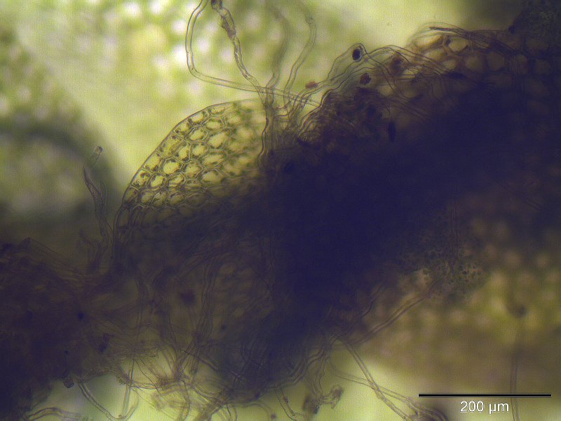 Müllers Bartkelchmoos (Calypogeia muelleriana), Unterblatt, Vergrößerung: 125x